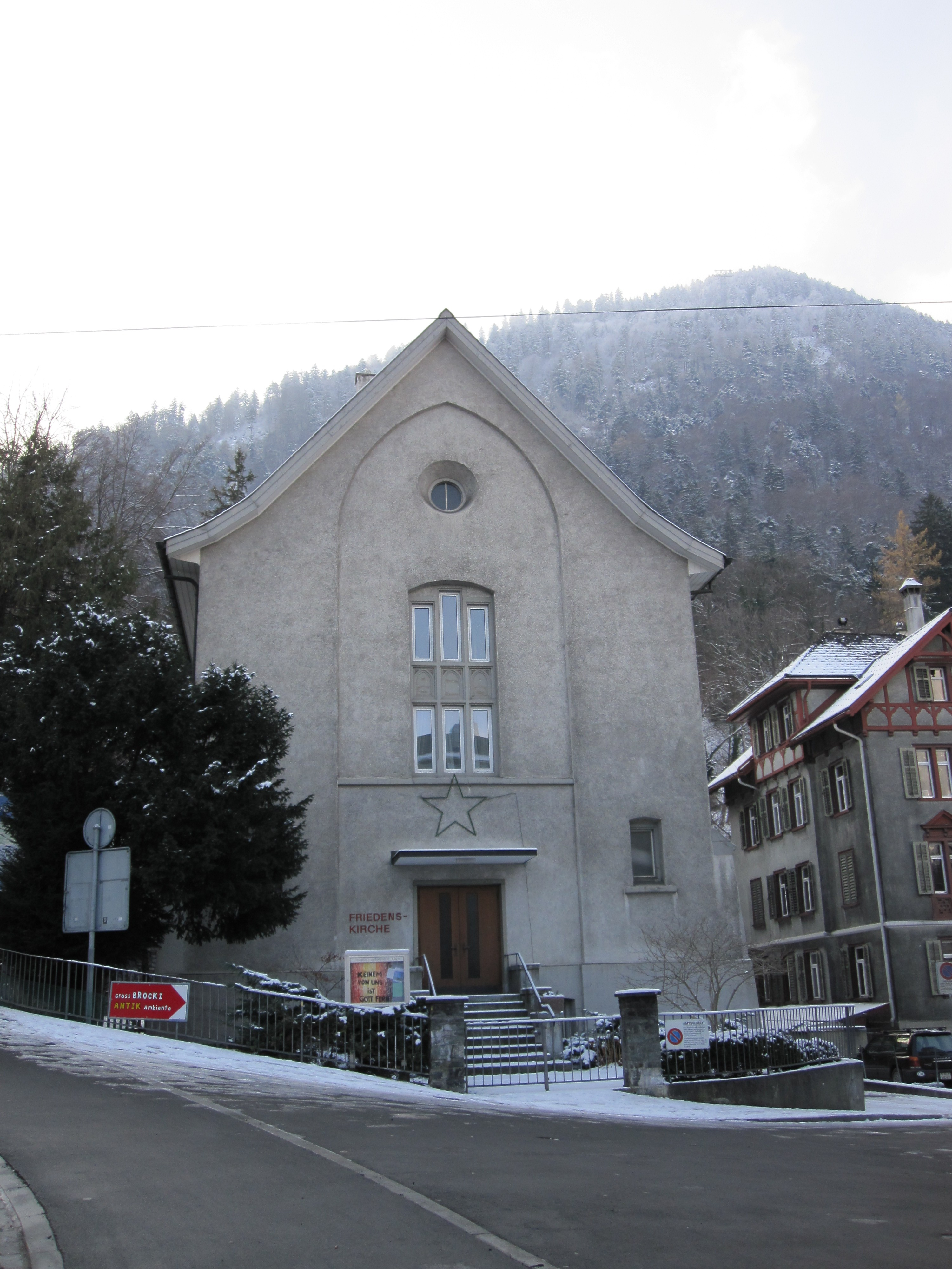 methodistische Friedenskirche in Chur